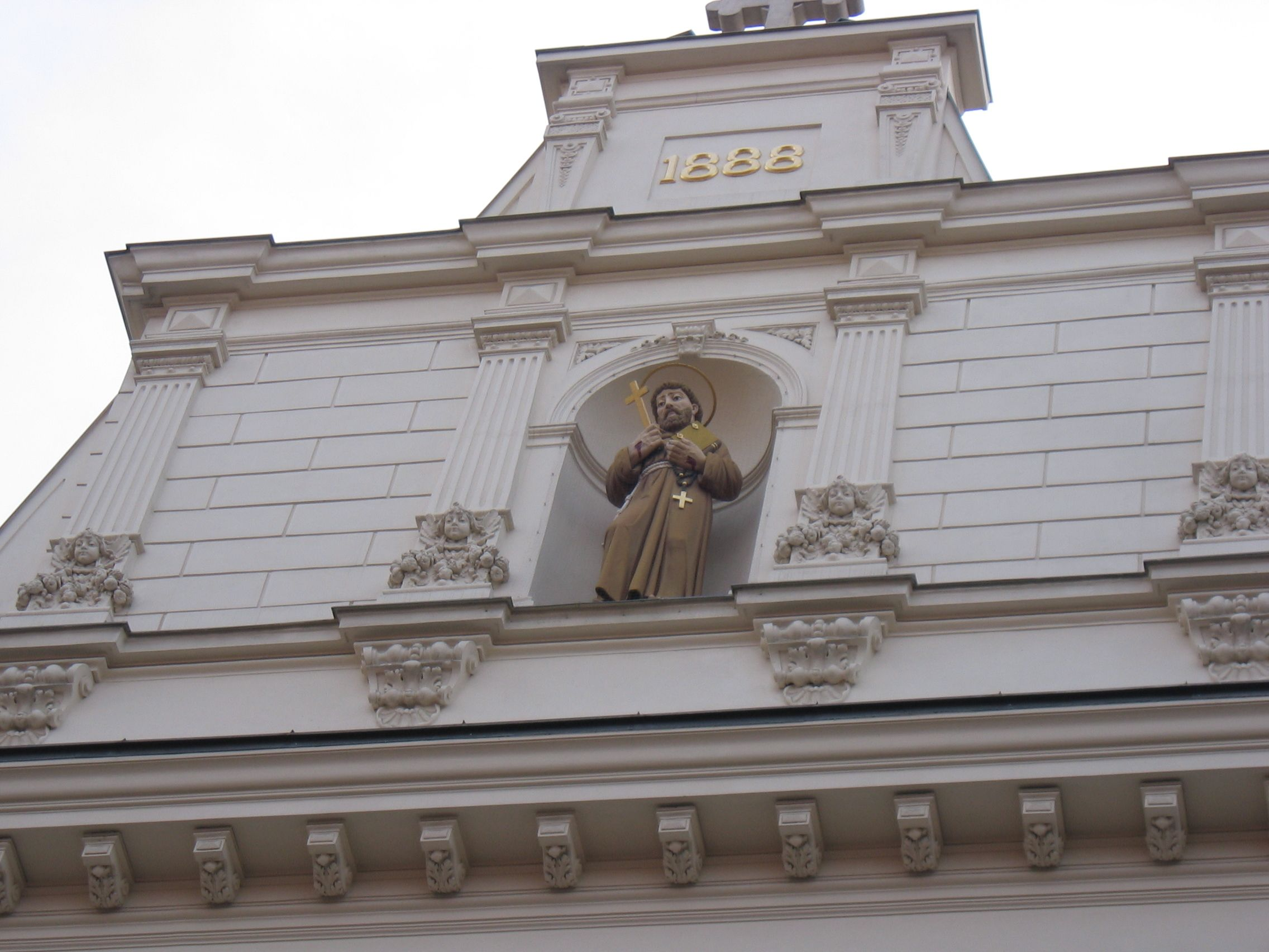 Giebel des Mutterhauses der Franziskanerinnen von der christlichen Liebe in Wien Margareten